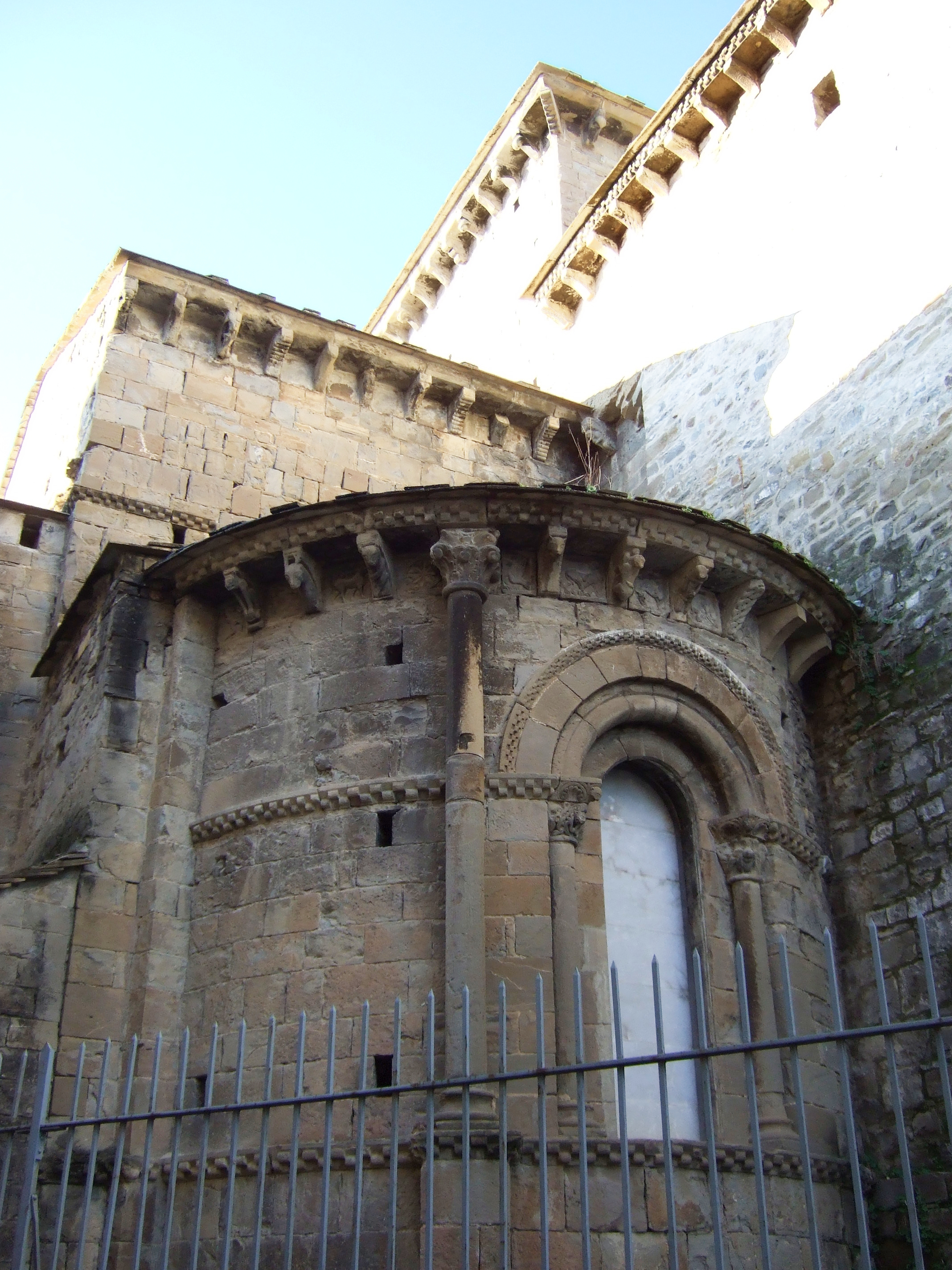 Jaca - Catedral - Ábside